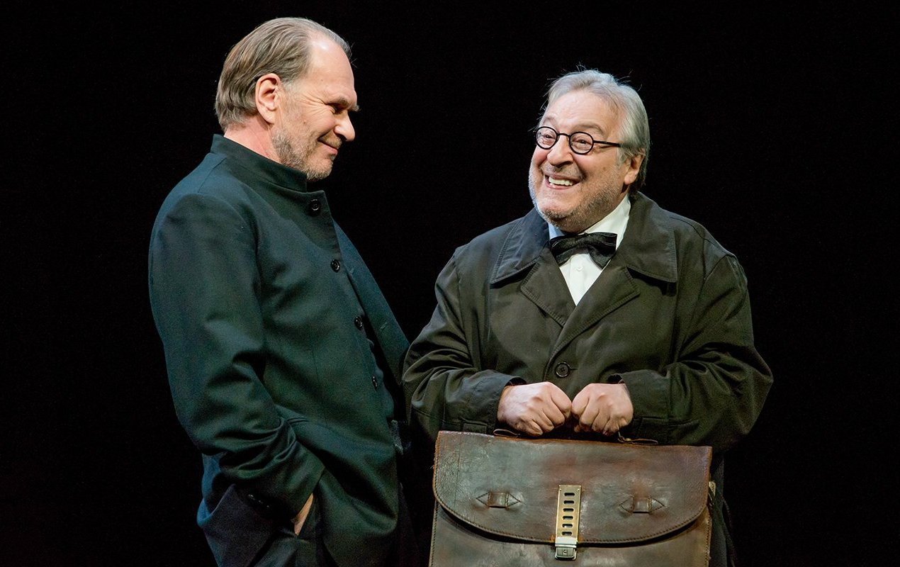 Народный артист России Алексей Гуськов и народный артист РСФСР Геннадий Хазанов в спектакле «Фальшивая нота»